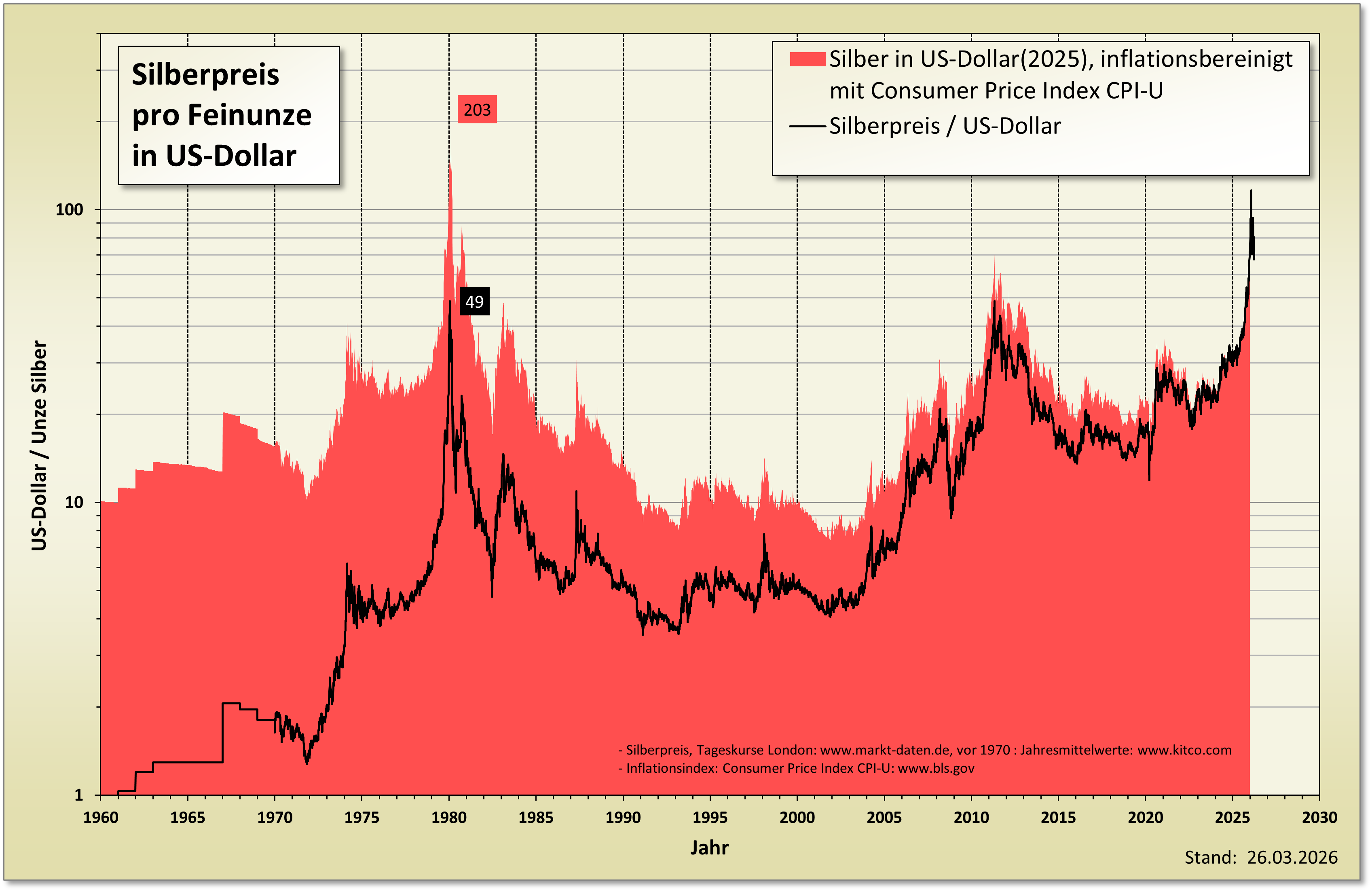 Historischer Silberpreis in US-Dollar, sowie inflationsbereinigter Silberpreis in US-Dollar